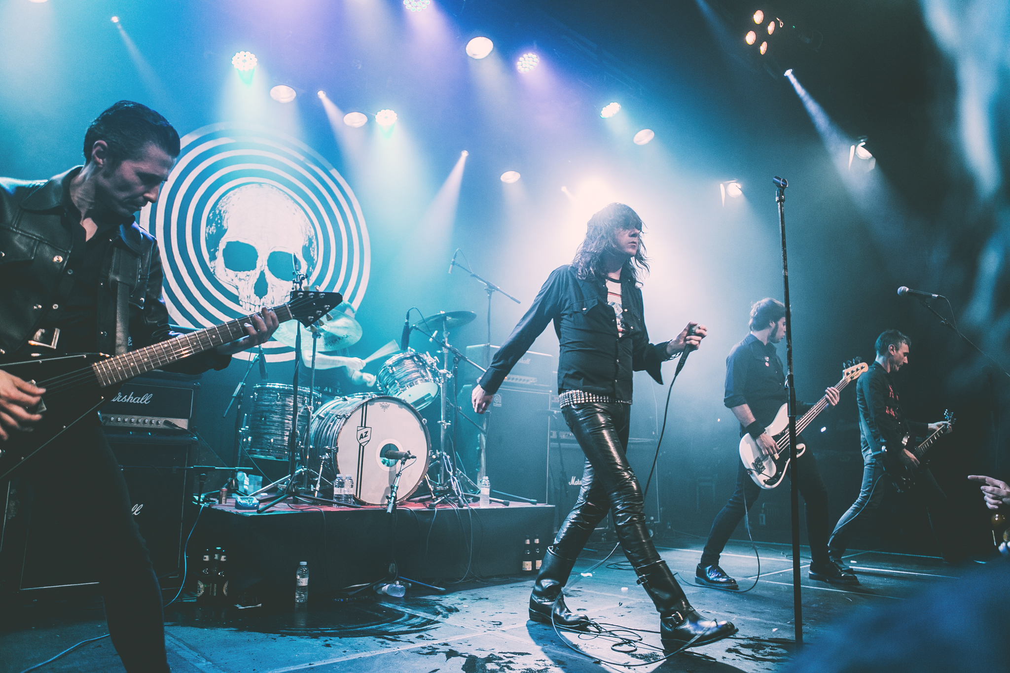 Dkluba kontzertua Intxaurrondo K.E.an. Argazkiak/fotos: Lorena Otero 2017/11/18